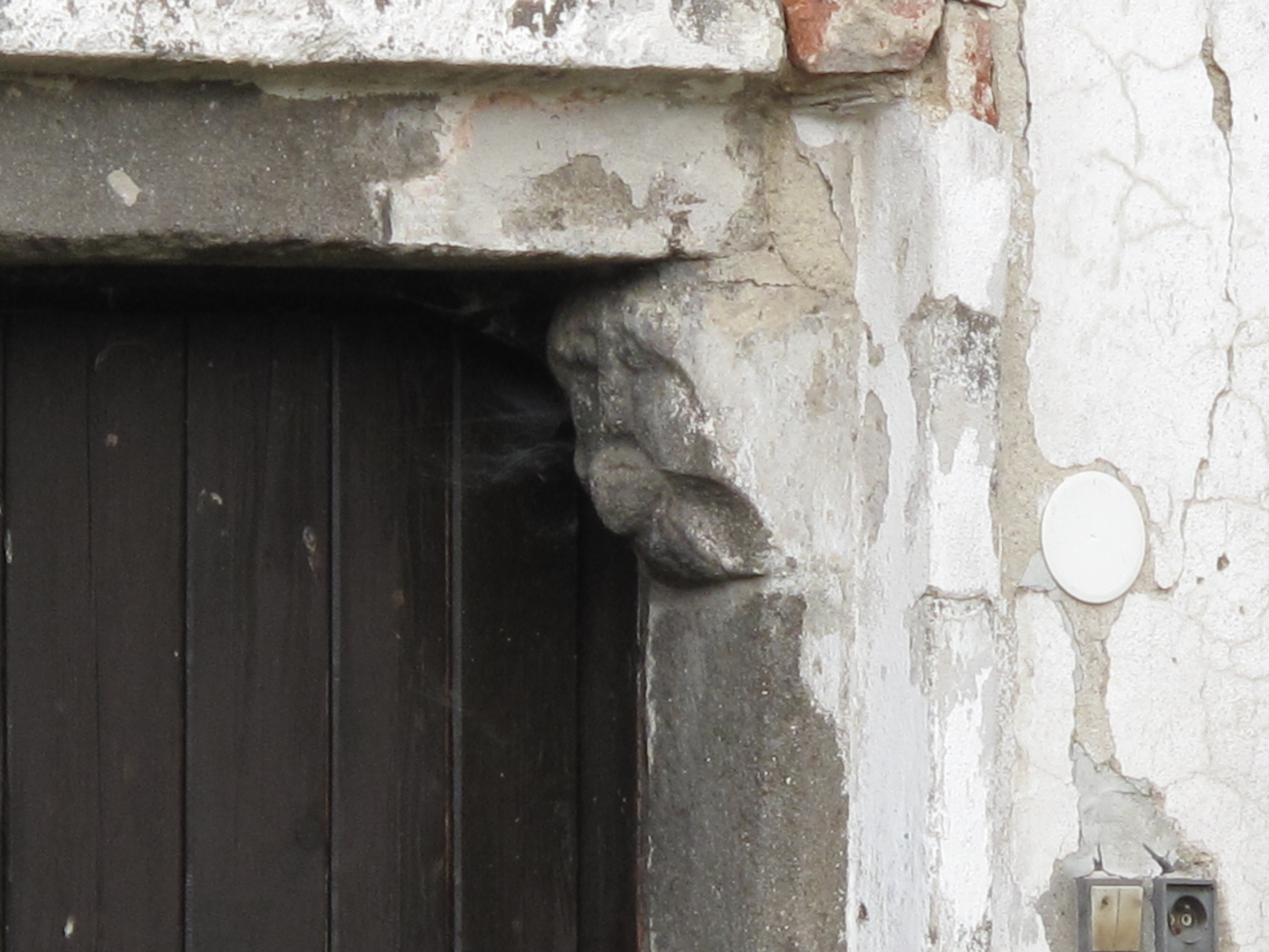 Hlavička ostění v Želibořicích. Okres Prachatice, Česká republika.